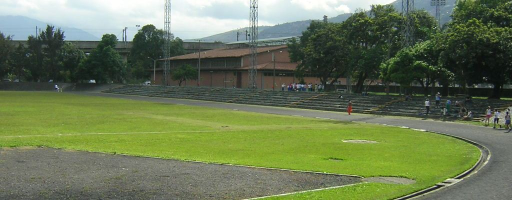 Estadio y Coliseo, parte de la Unidad deportiva de la Universidad de Antioquia, Medellín, Colombia (esta foto la tome yo, y la libero al dominio público)